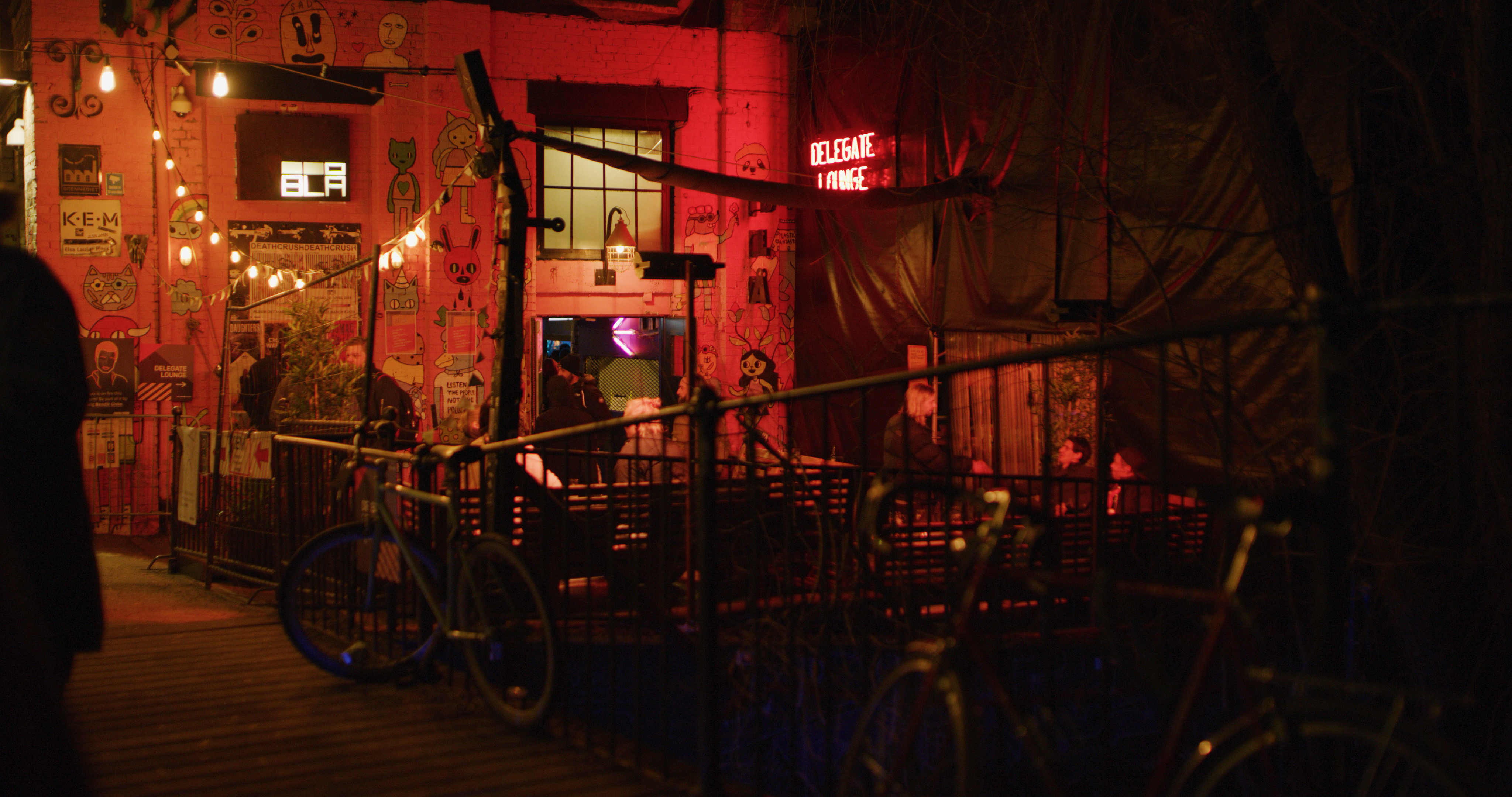 Inngang Blå. Foto av David Solbjørg